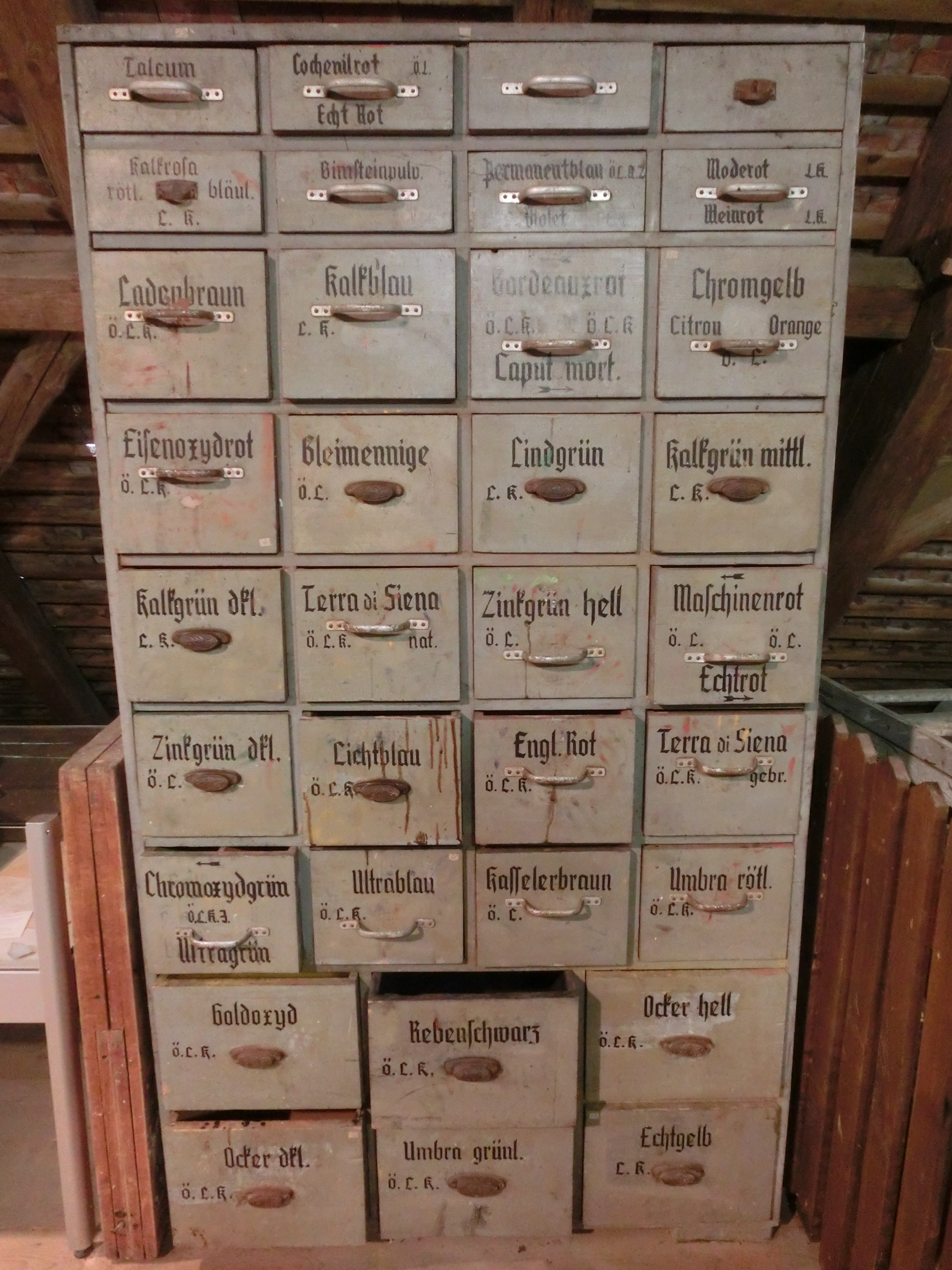 Deutschland (D) - Baden-Württemberg (BW) - Landkreis Biberach (BC) - Bad Schussenried, Oberschwäbisches Museumsdorf Kürnbach: Schrank zur Aufbewahrung von Pigmenten im Haus "Hepp-Ailinger"